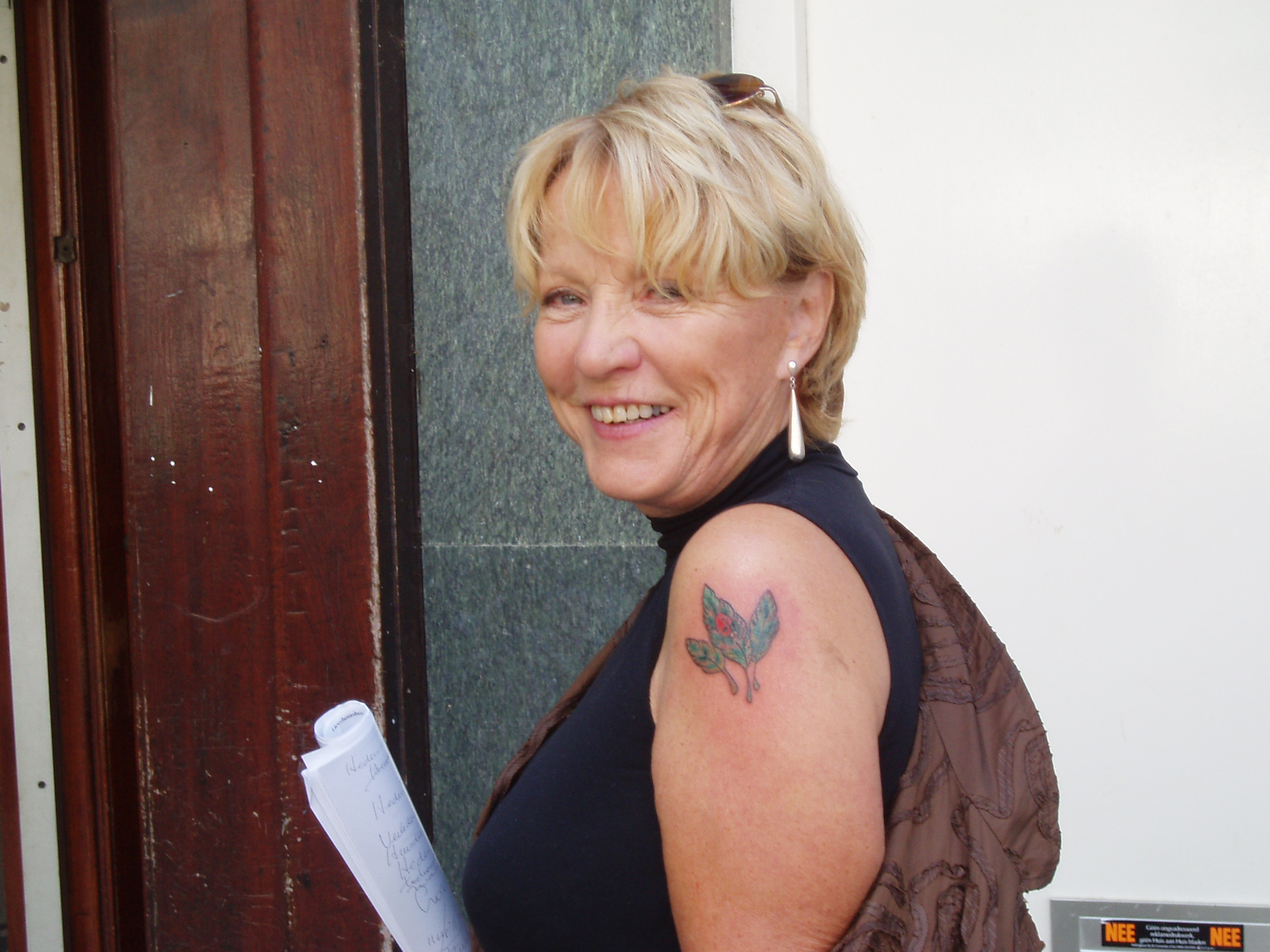 Ria Bremer (geboren als Maria Theresia Sitskoorn, Rotterdam, 4 juli 1939) is een Nederlands journaliste en presentatrice, die vooral bekend is geworden door de televisieprogramma's Stuif es in en Vinger aan de pols van de AVRO.